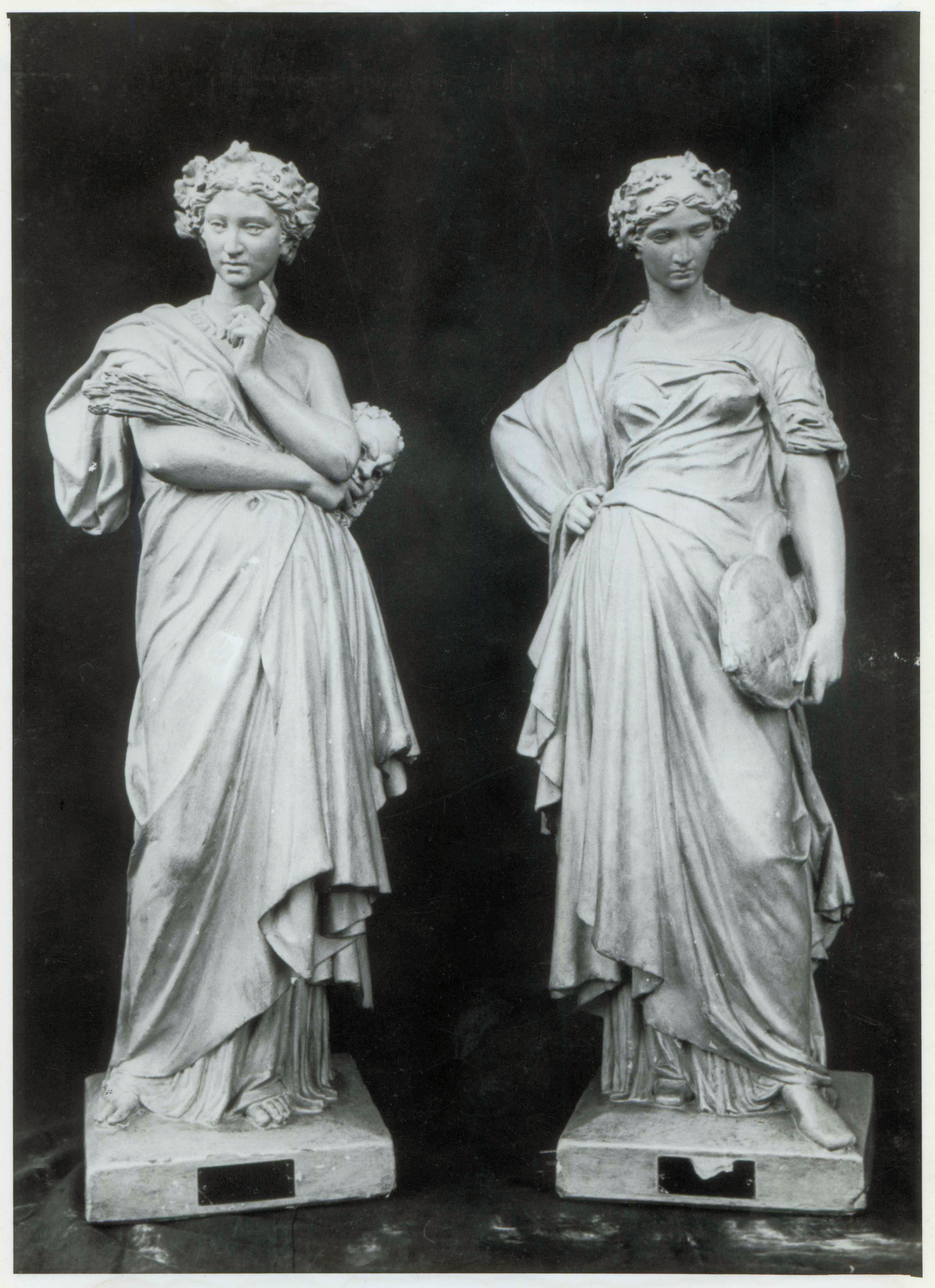 Maquettes en plâtre des muses Thalie et Calliope sculptées par Guillaume Bonnet